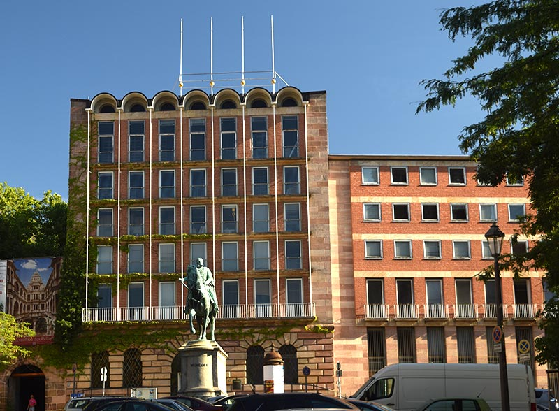 Nürnberg, Pellerhaus, Südfassade (Sitz des Deutschen Spielearchivs Nürnberg)